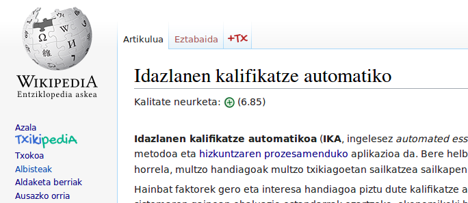 Artikulu-kalifikatze automatikoa. Euskal Wikipediako "Artikulu-kalifikatze automatikoa" artikuluaren kalitate-neurketaren emaitzak.